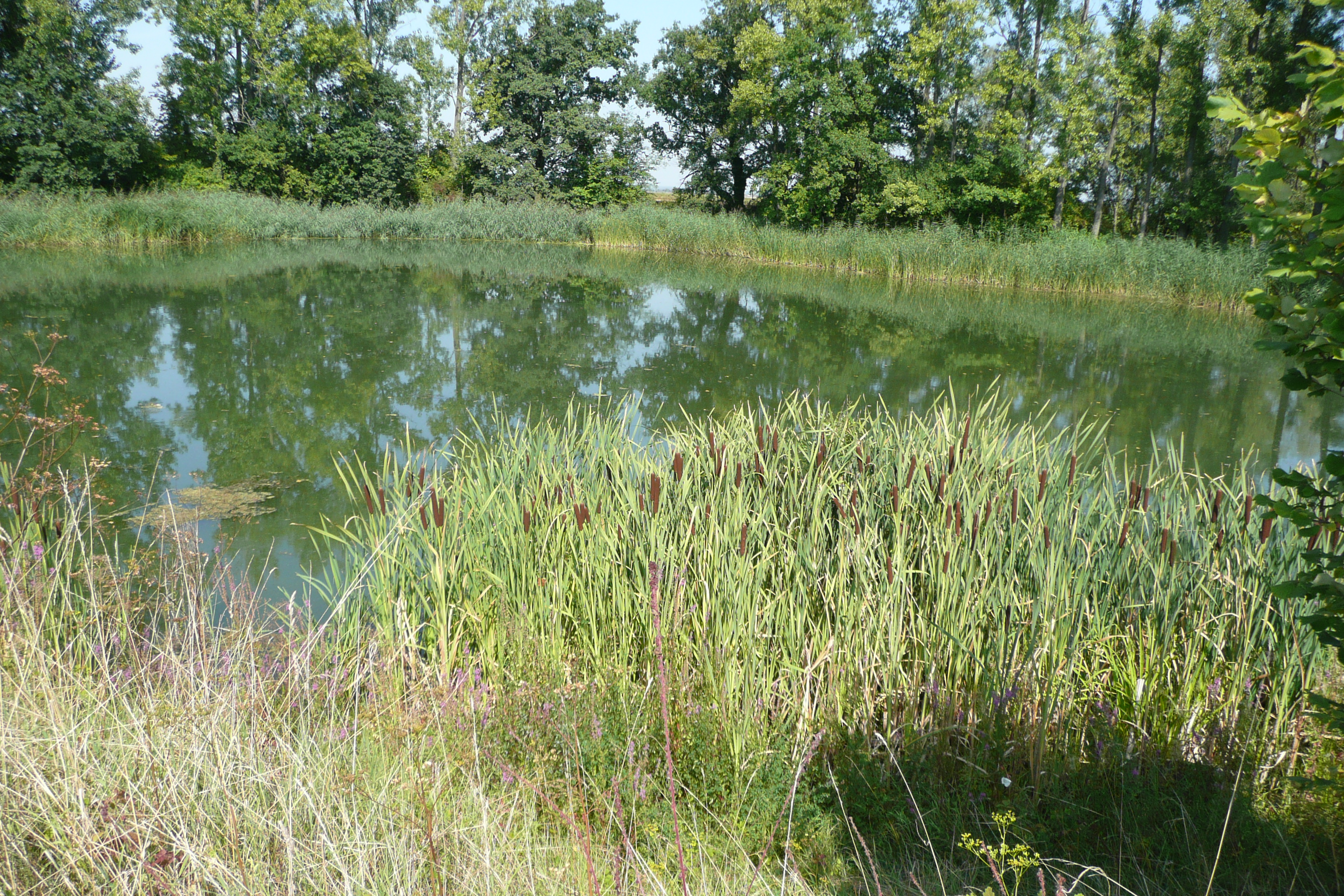 Kolk "Altloch", mit Rohrkolben, 1798 bei Dammbruch durch Ausspülung entstanden. Bei dem Hochwasser im Januar 1955 wurde dort eine undichte Stelle entdeckt, die Bruchstelle abgedichtet und das Loch später teilweise zugeschüttet.